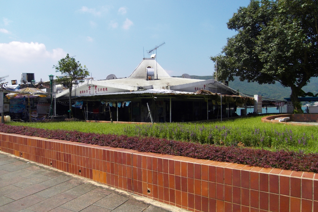 中文（香港）: 梅窩熟食市場